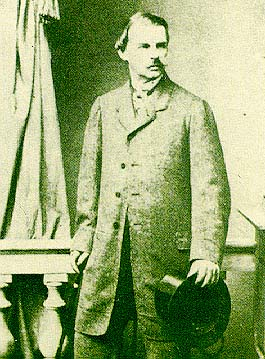 Maximiliaan Jozef in Beieren , zie ook File:Herzog Max Joseph in Bayern.jpg